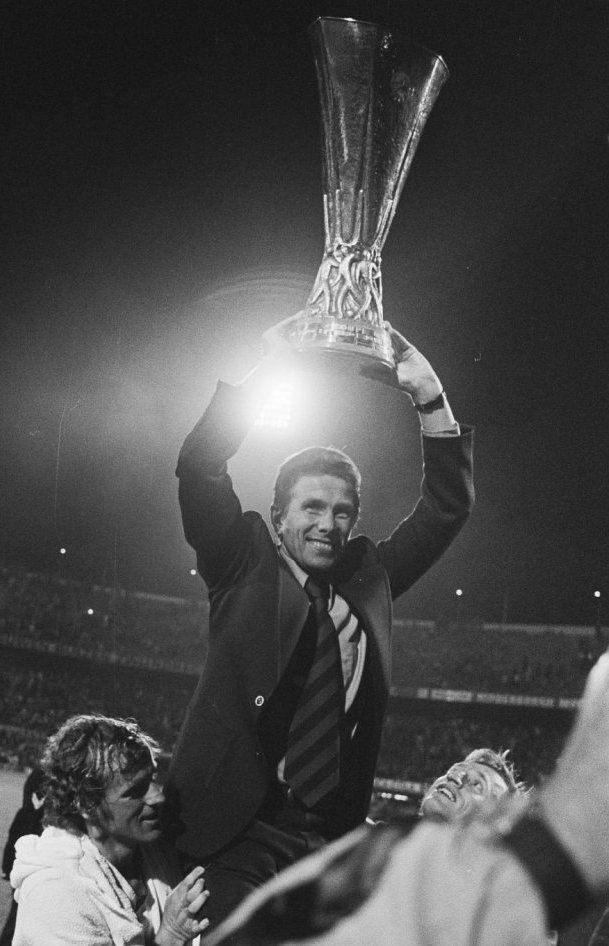 Wiel Coerver viert de verovering van de UEFA Cup met Feyenoord in 1974